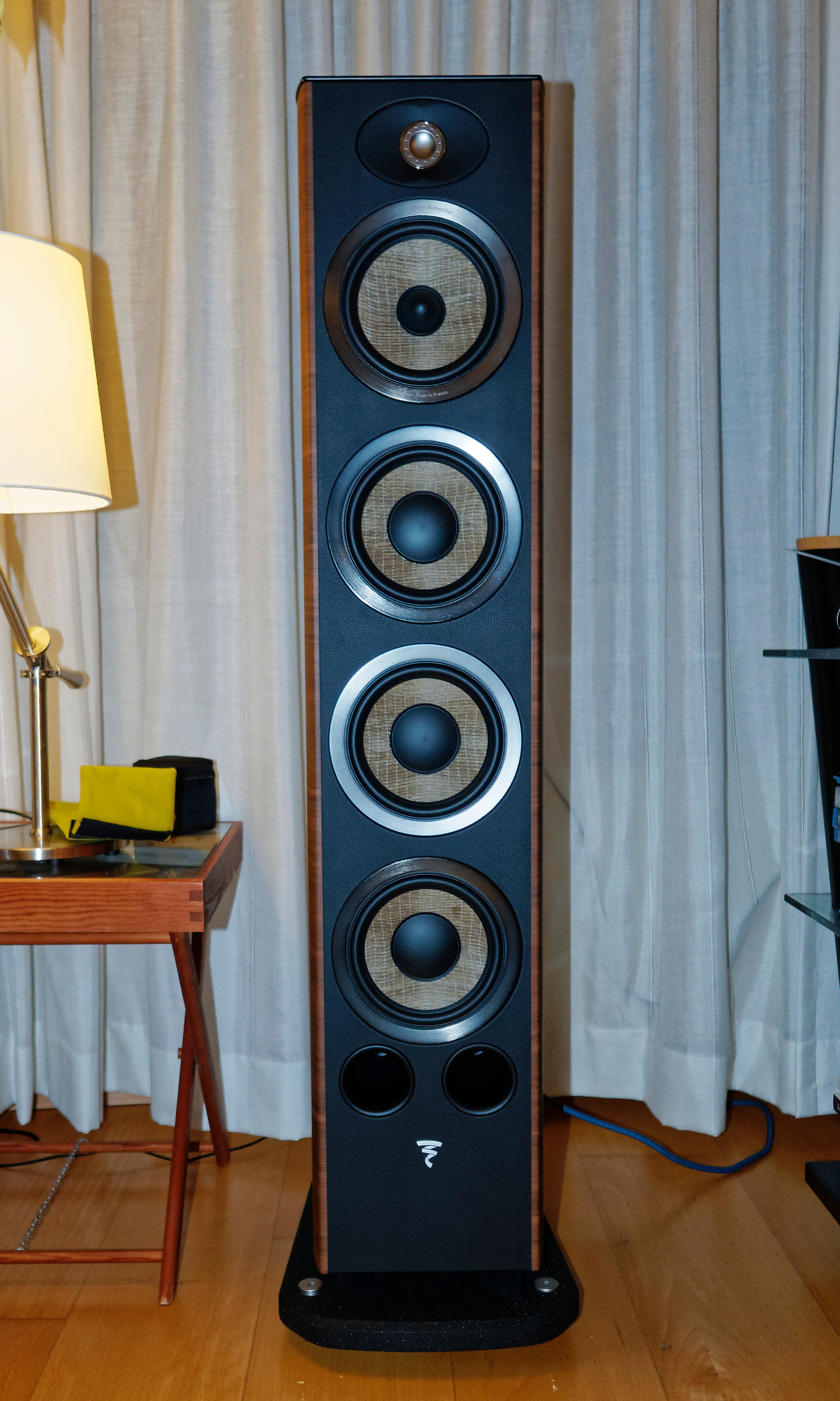 Une enceinte Focal Aria 936 dans un salon. Elle est composée d'un tweeter à dôme inversé en aluminium/magnésium, un haut-parleur de médium de 16,5 cm en lin et de trois haut-parleurs de graves de 16,5 cm en lin également, de deux évents bass-reflex en façade ainsi que d'un évent vers le sol.